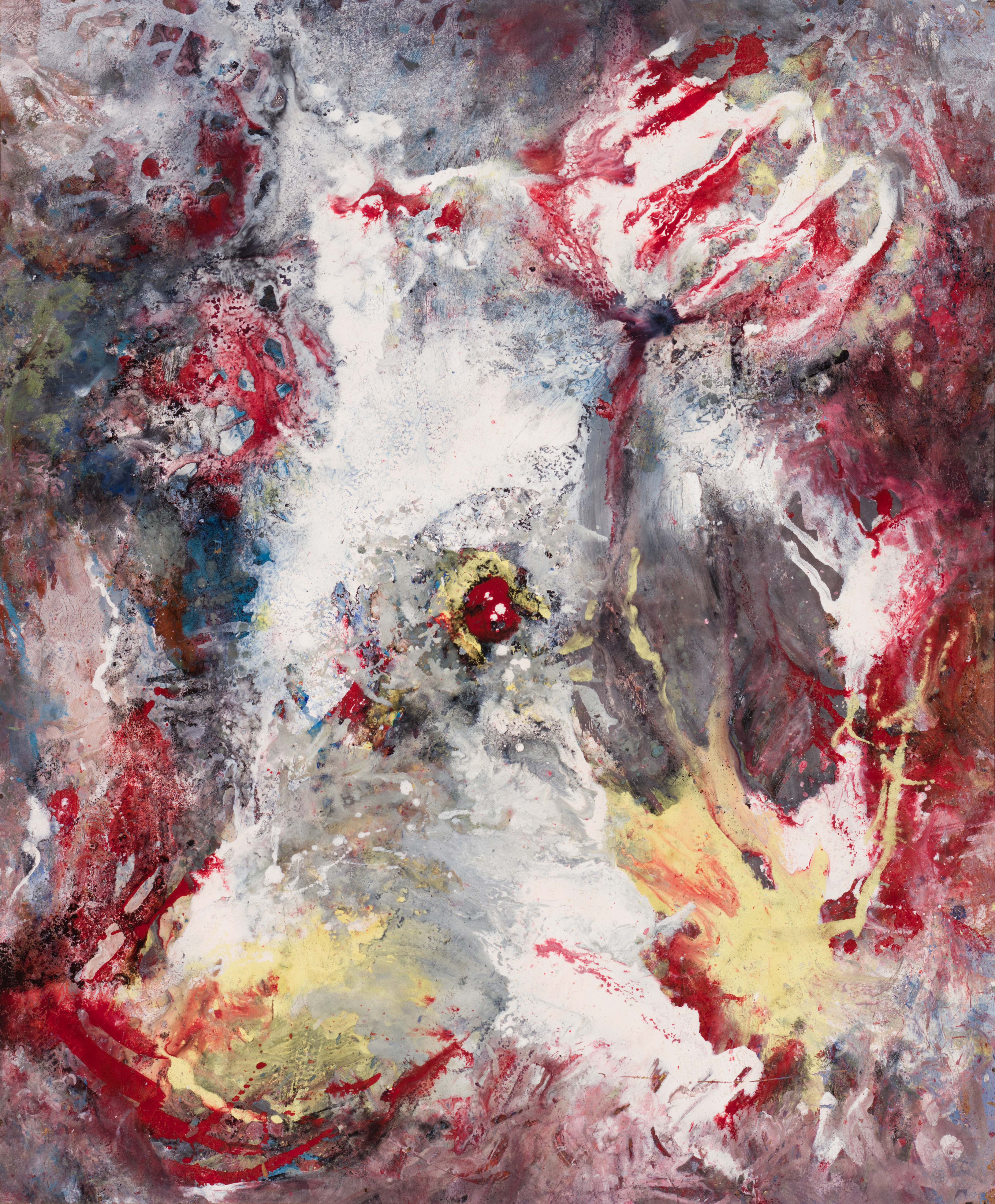 Lola Liivat - Kevad I; 1967; Tartu Kunstimuuseum